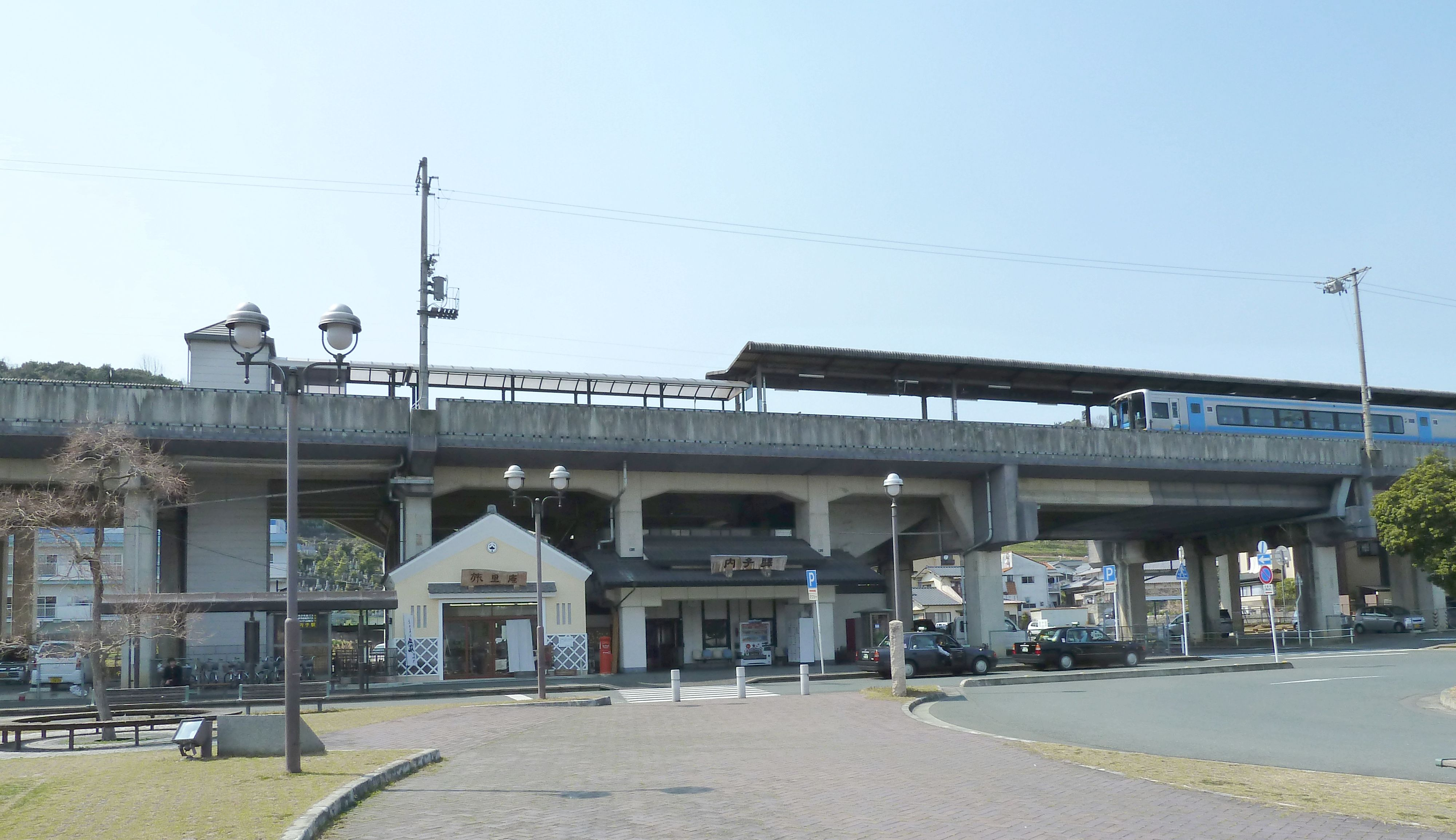 内子駅の駅舎